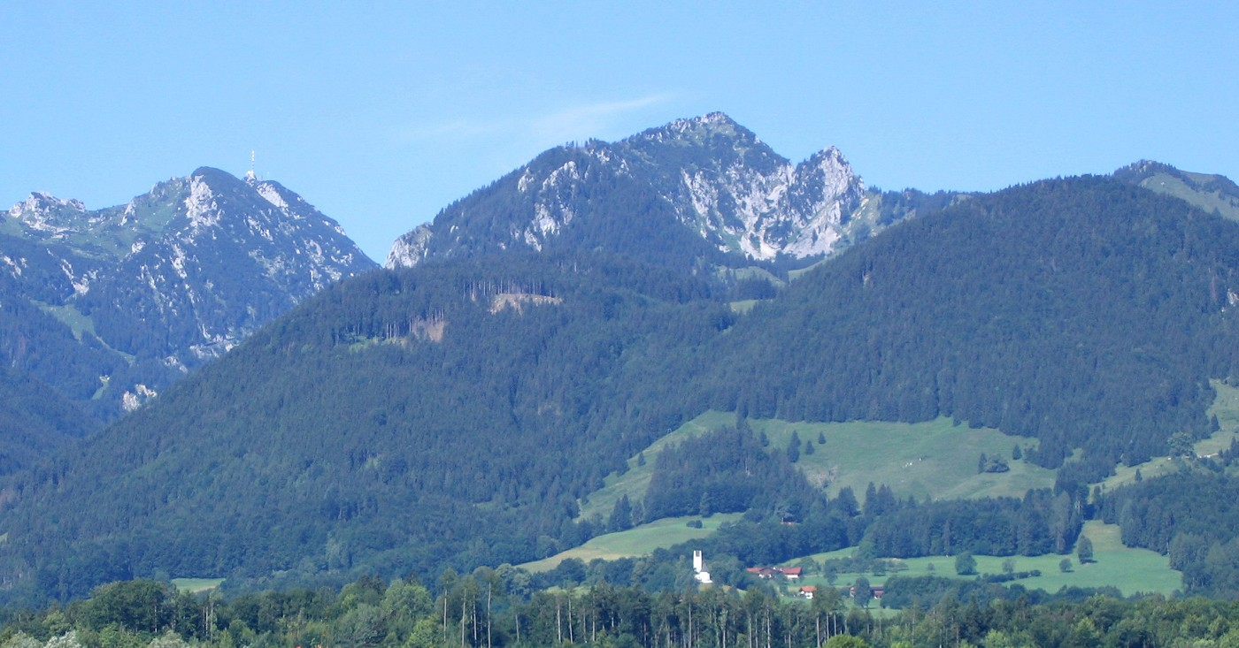 Wendelstein (links), Hochsalwand (Mitte) mit Lechnerkopf, von Flintsbach aus gesehen